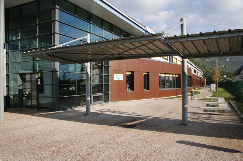 Un BTP CFA dana la Savoie